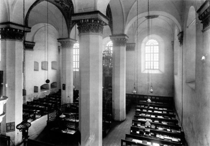 Інтер`єр Великої синагоги в Острозі.